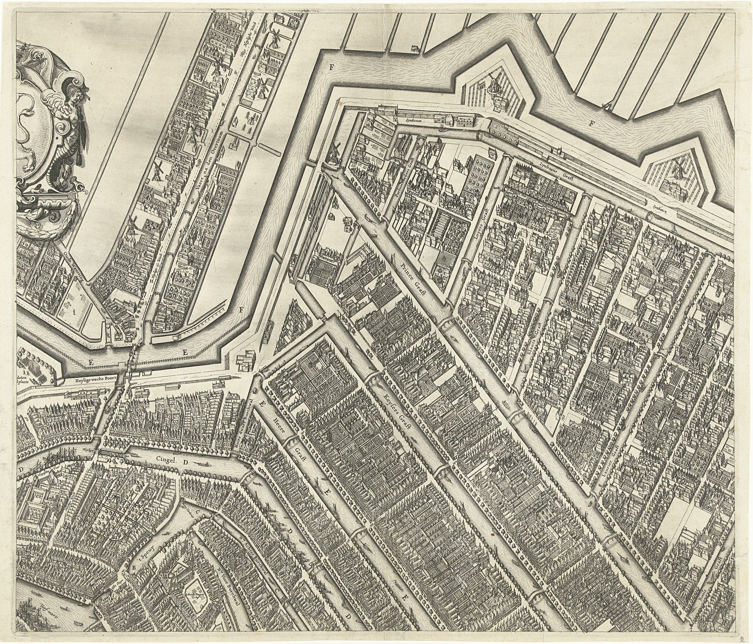 Grote plattegrond van de stad Amsterdam uit 1625. Linksboven een gezicht op de stad en rechtsboven een kaart van de omgeving. Rechts een lijst met de namen van straten aan de Oude en de Nieuwe stadszijde. De plattegrond is samengesteld uit negen platen, waarvan twee ontbreken. Dit is het blad middenboven met het begin van de Overtoom en het Begijnenhof.